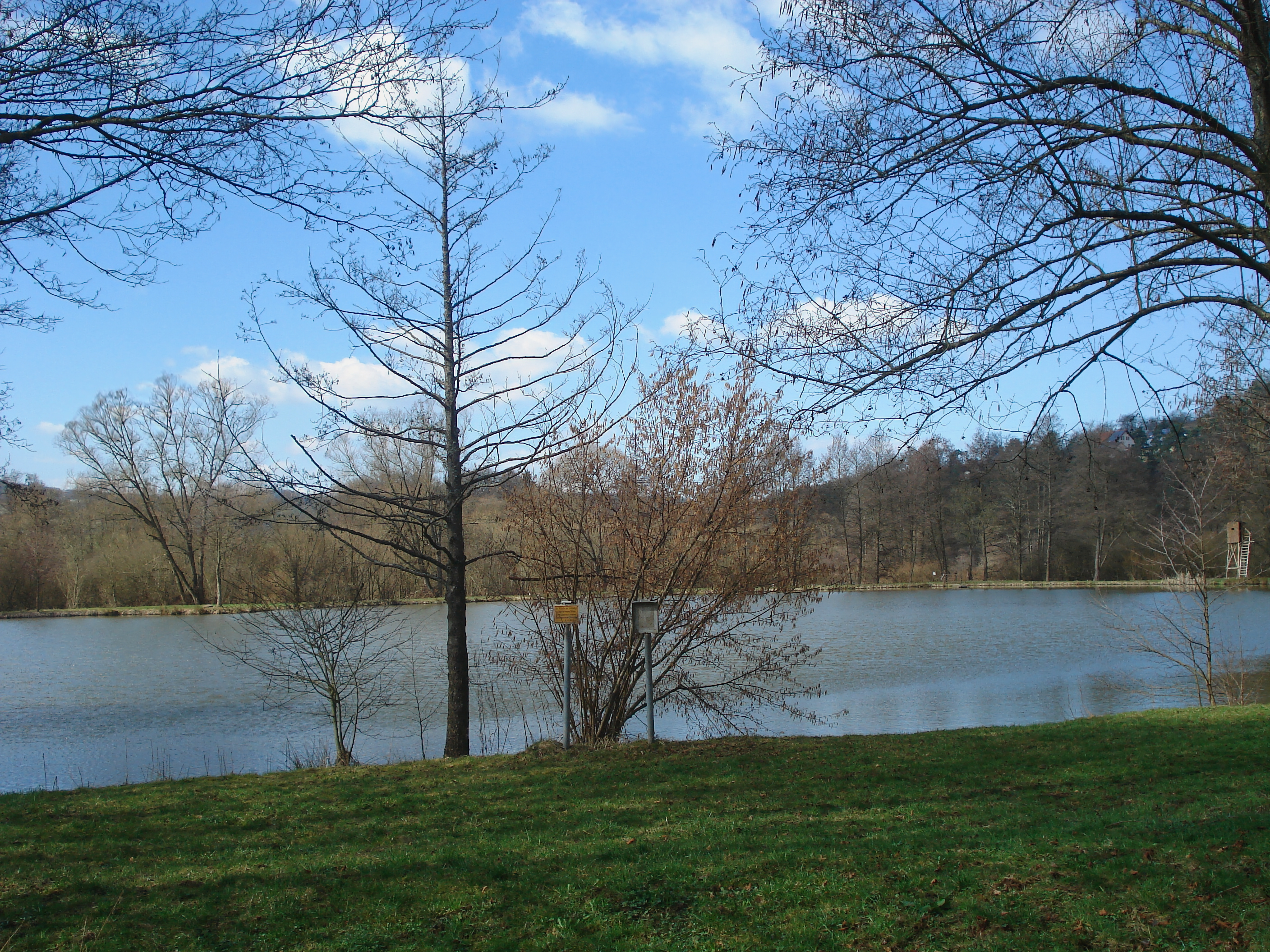 Der Sterzenbachweiher